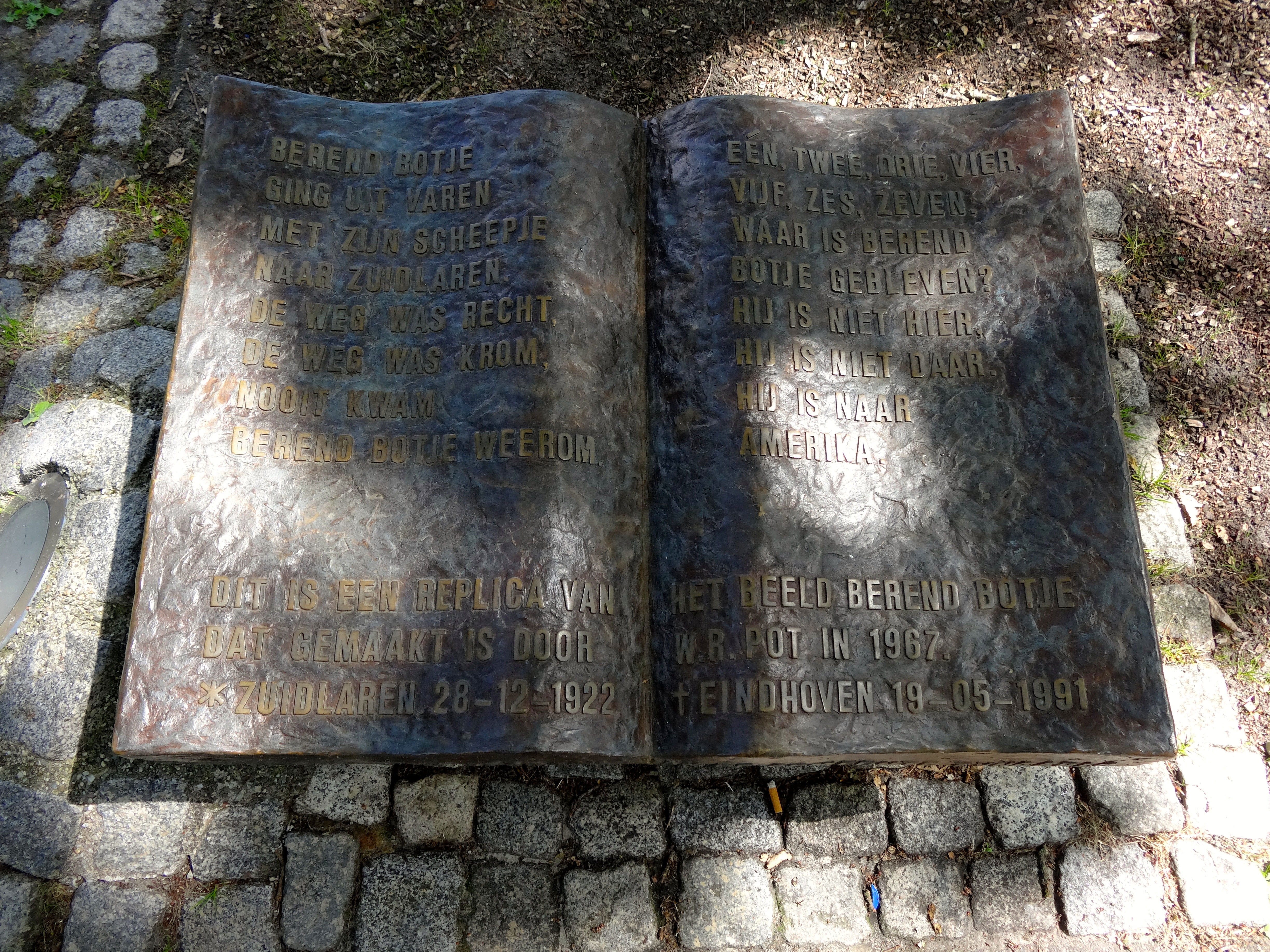 Bronzen beeld van een opgeslagen boek met de tekst van het liedje van Berend Botje, geplaatst bij de bronzen replica van het beeld, dat oorspronkelijk werd gemaakt door Willy Pot in Zuidlaren